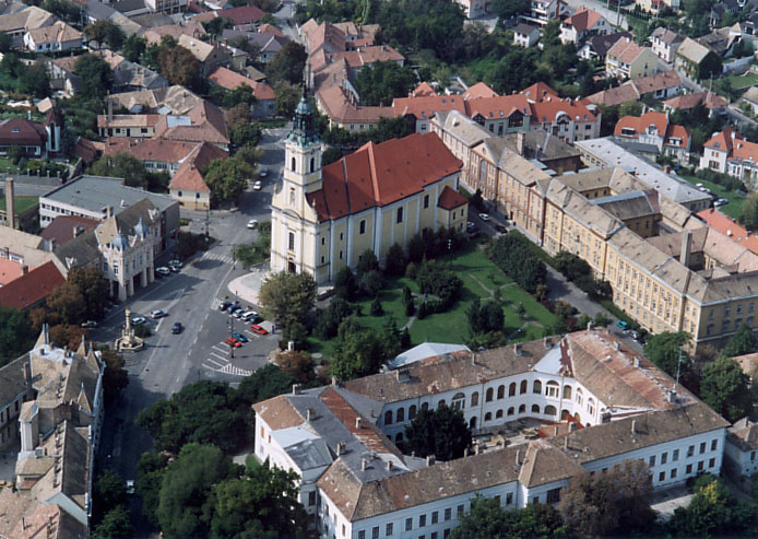 Szekszárd - Tolna megye - Hungary - Europe